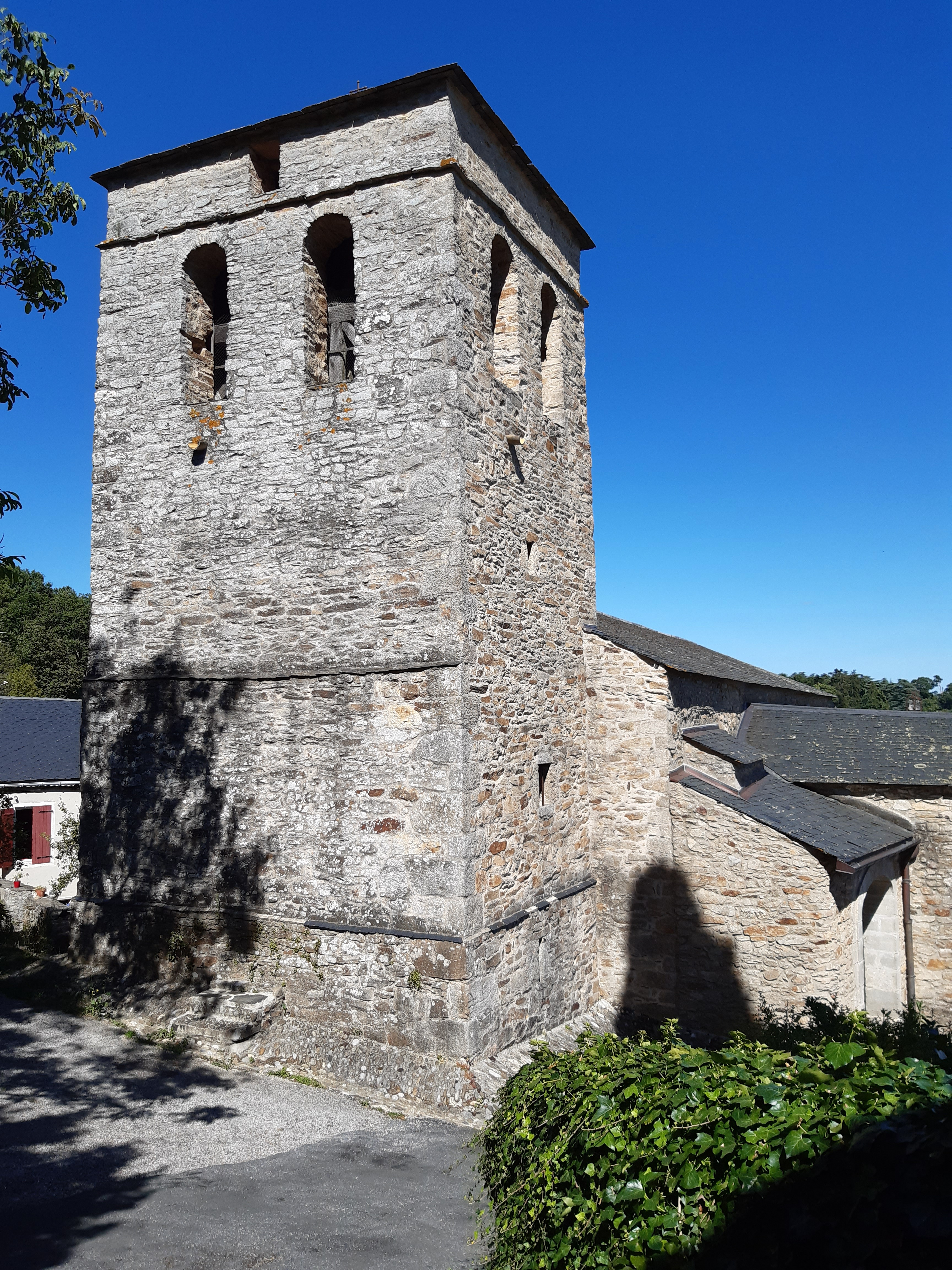 Le clocher de l'église Saint Clément à Fontiers-Cabardès en juillet 2020.